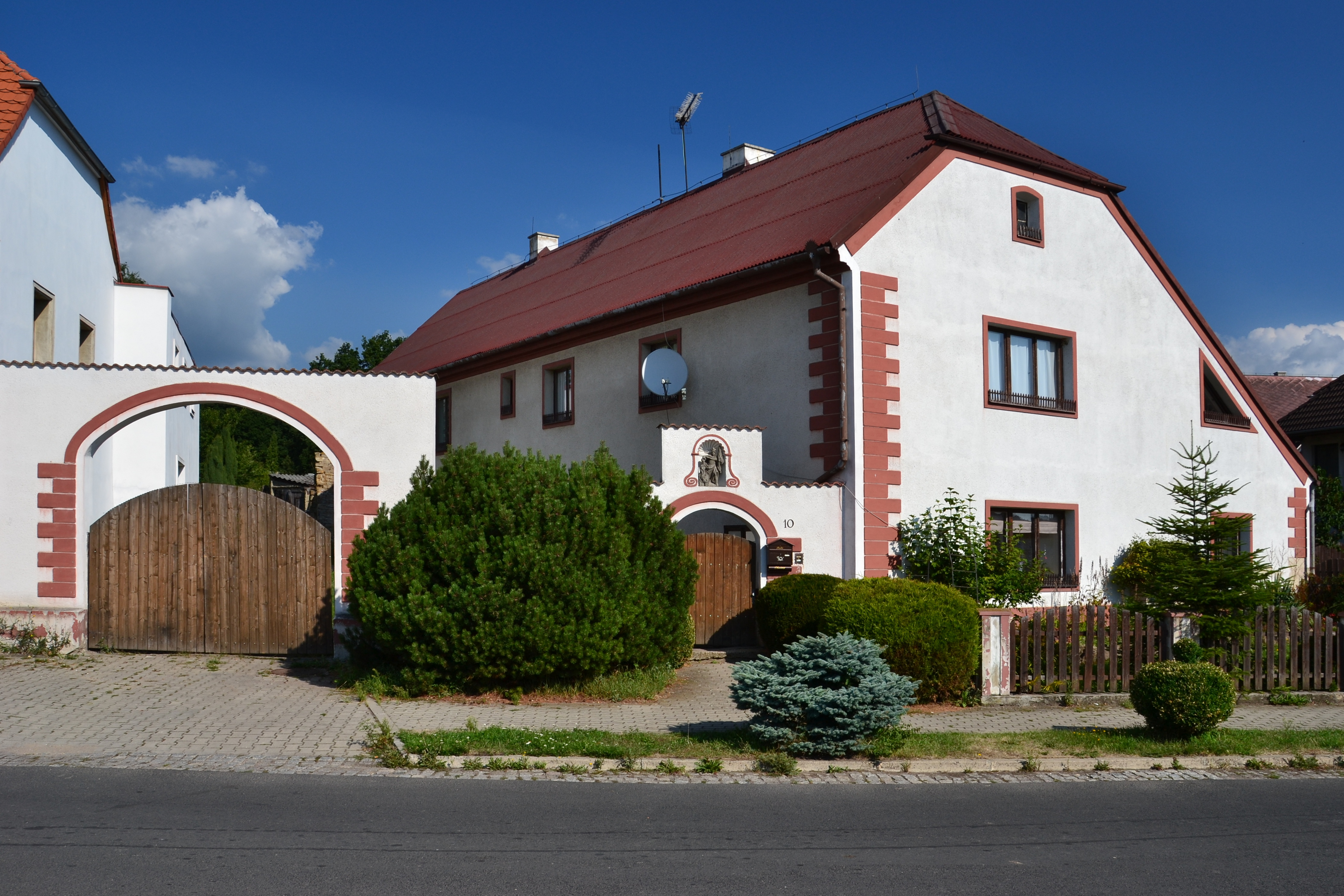 Venkovská usedlost (Černovice), Černovice 10